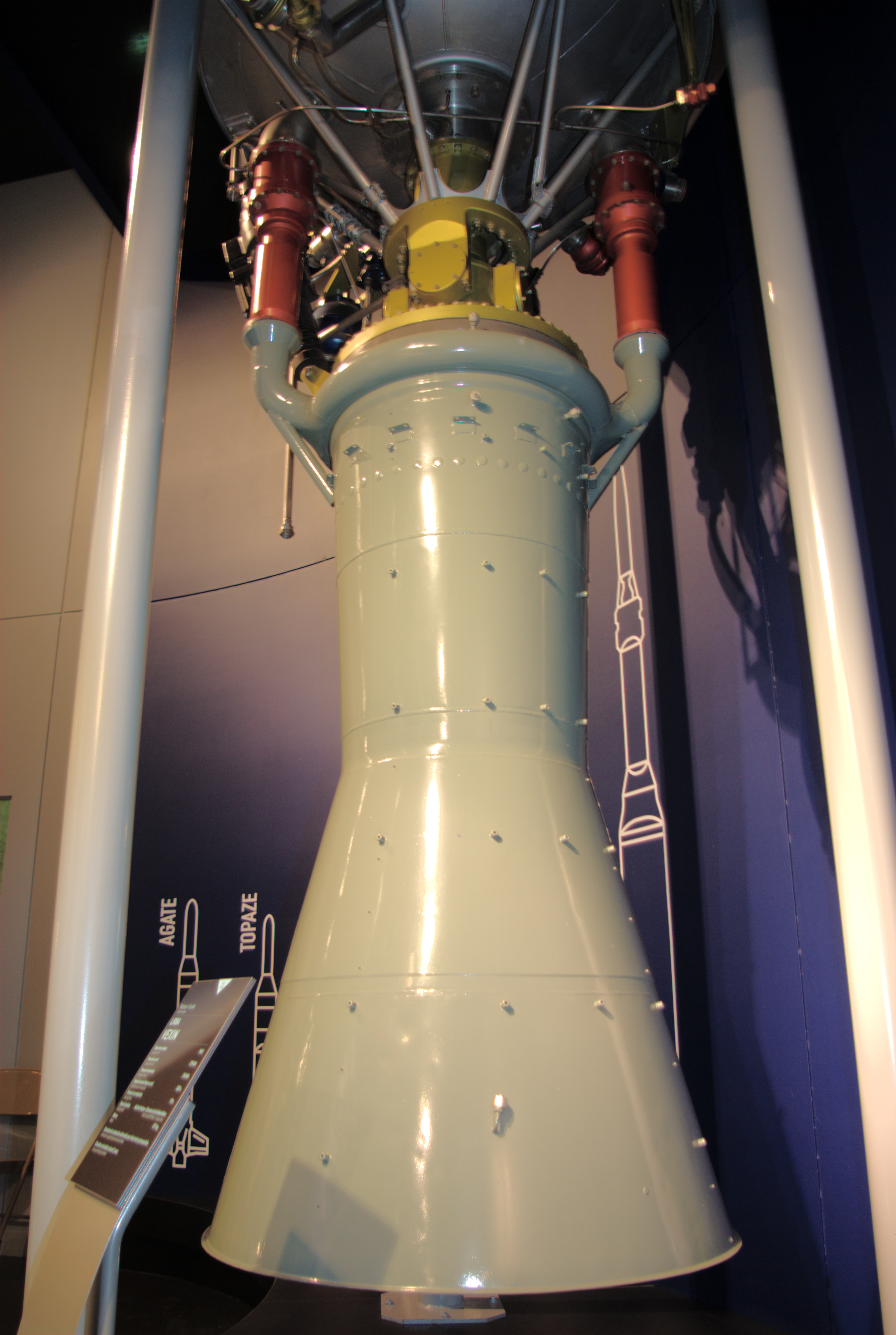 Propulseur LRBA Vexin utilisé sur les fusée Diamant. Il est exposé au musée Safran.